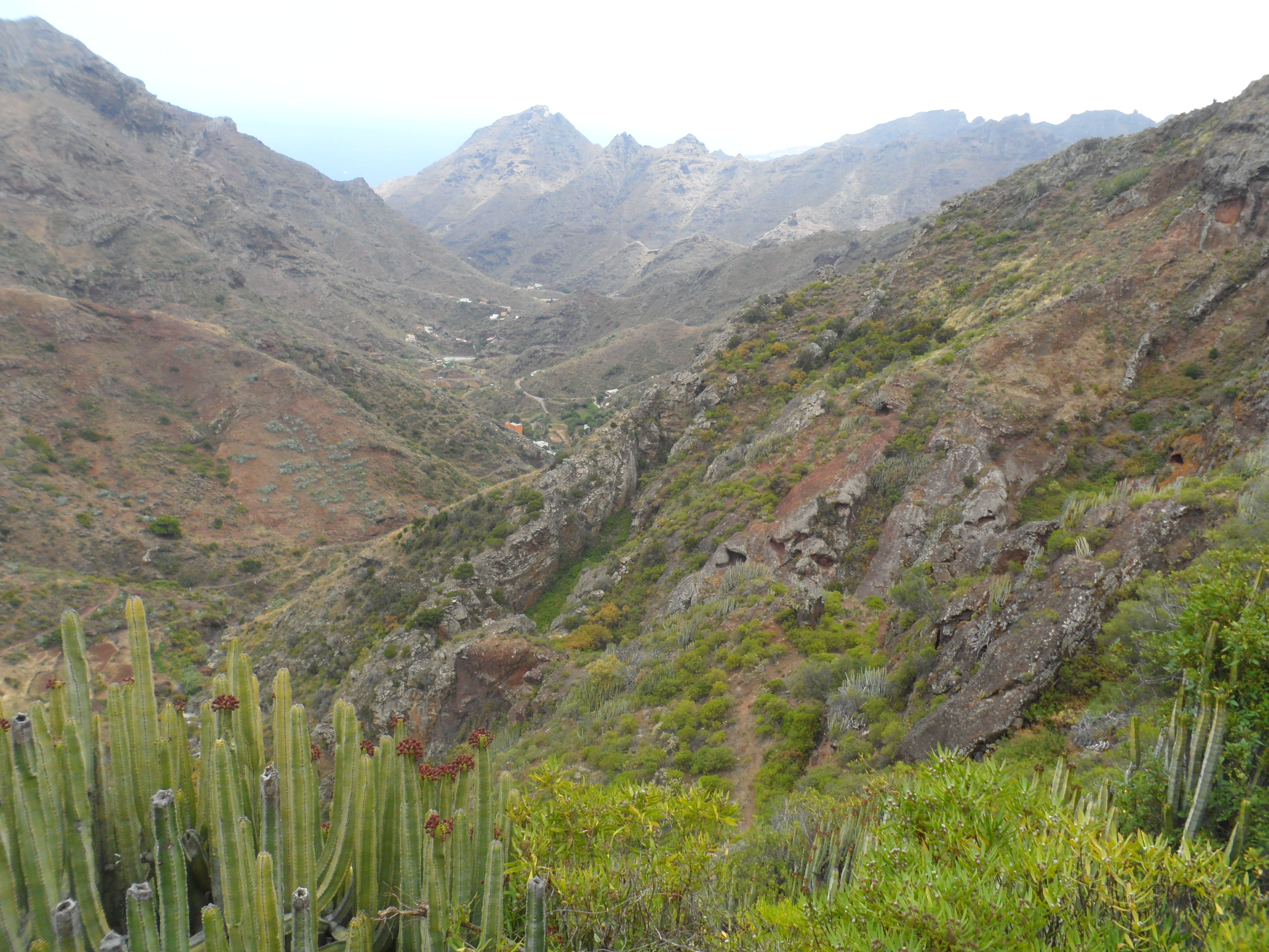 Sendero por el camino Valle Brosque por El Majimial